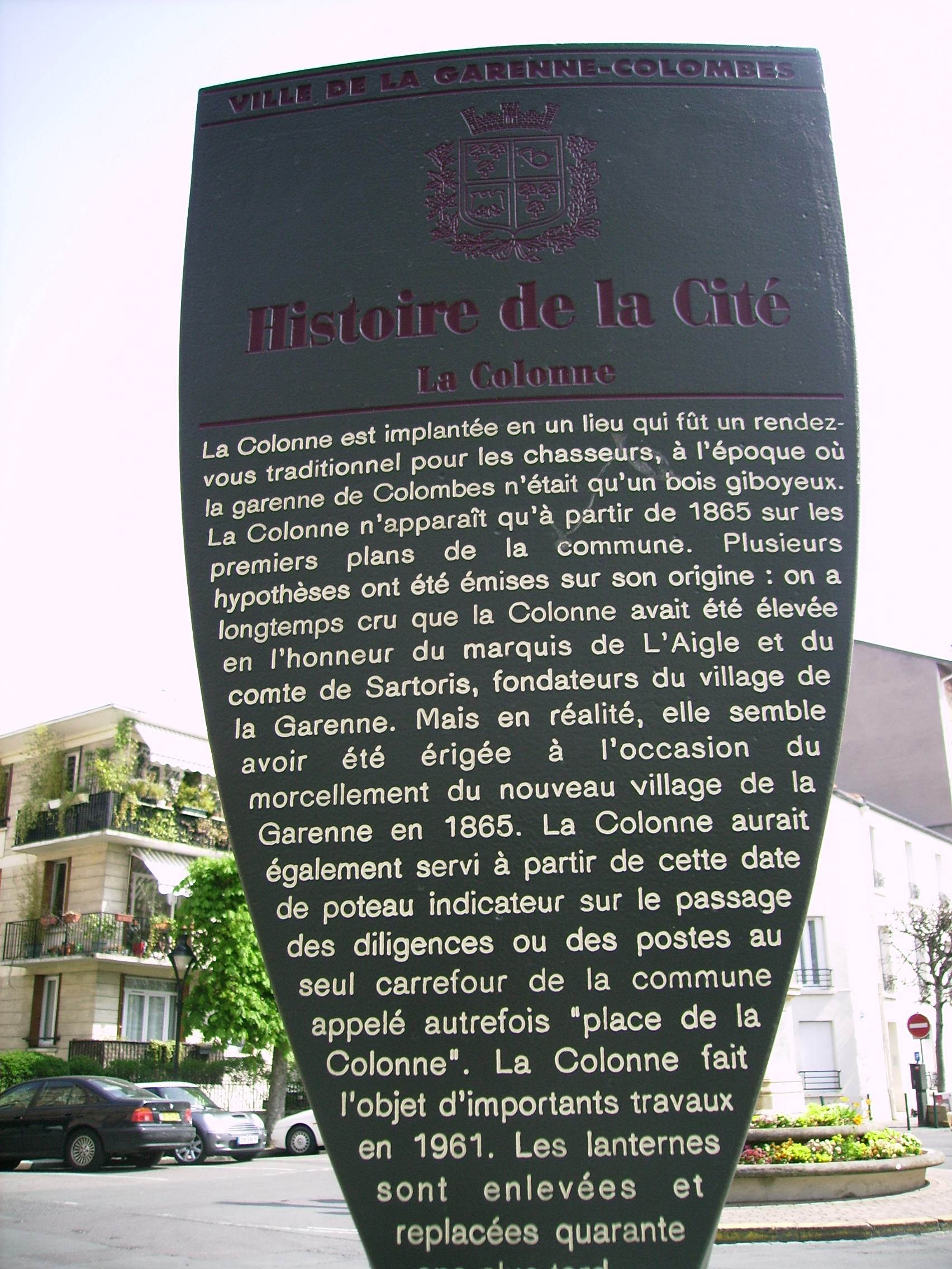 Panneau "Histoire de la cité"